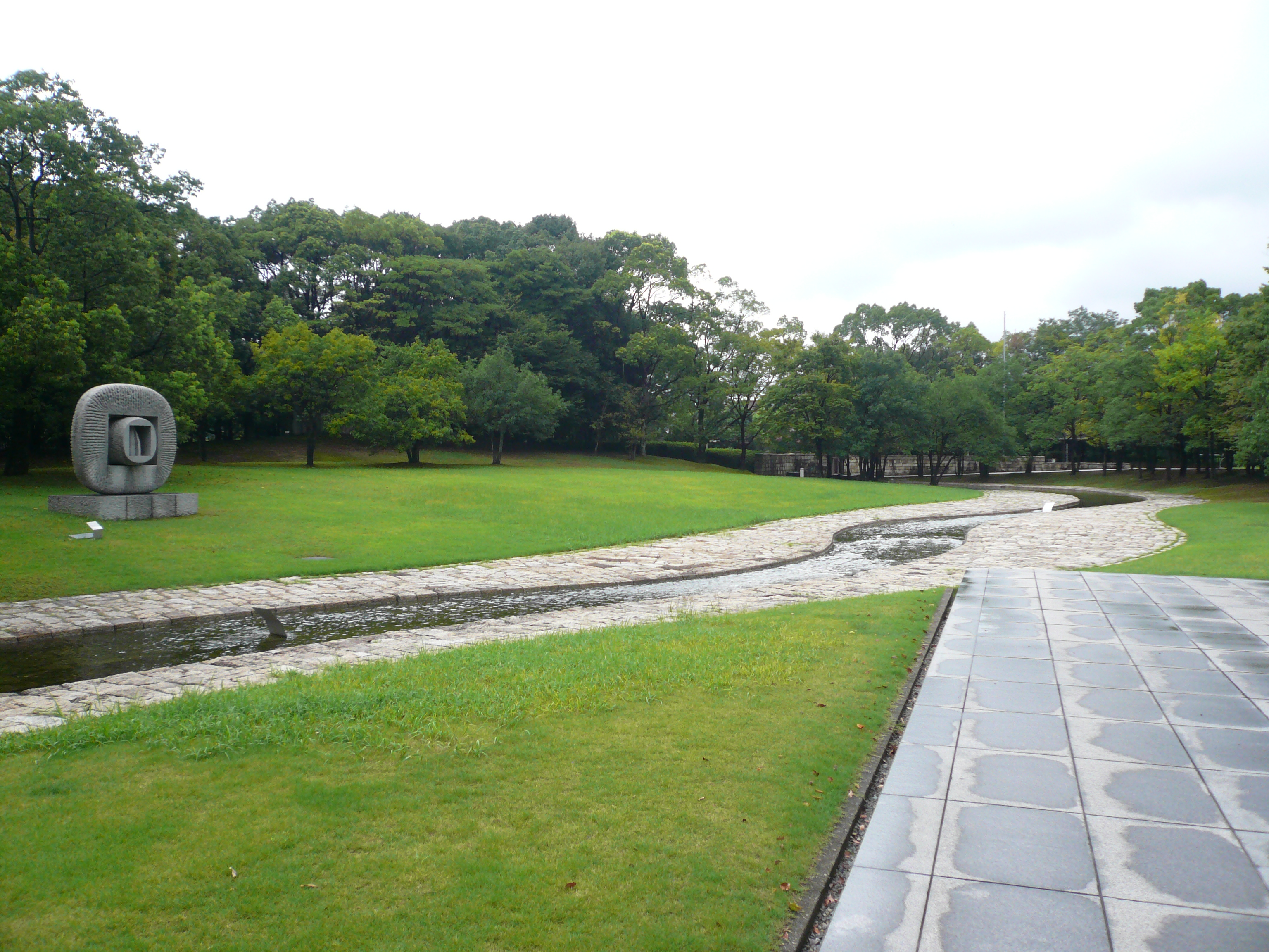 THE MUSEUM OF FINE ARTS,GIFU（岐阜県美術館）,Gifu,Gifu,Japan（岐阜県岐阜市）で撮影。敷地内。